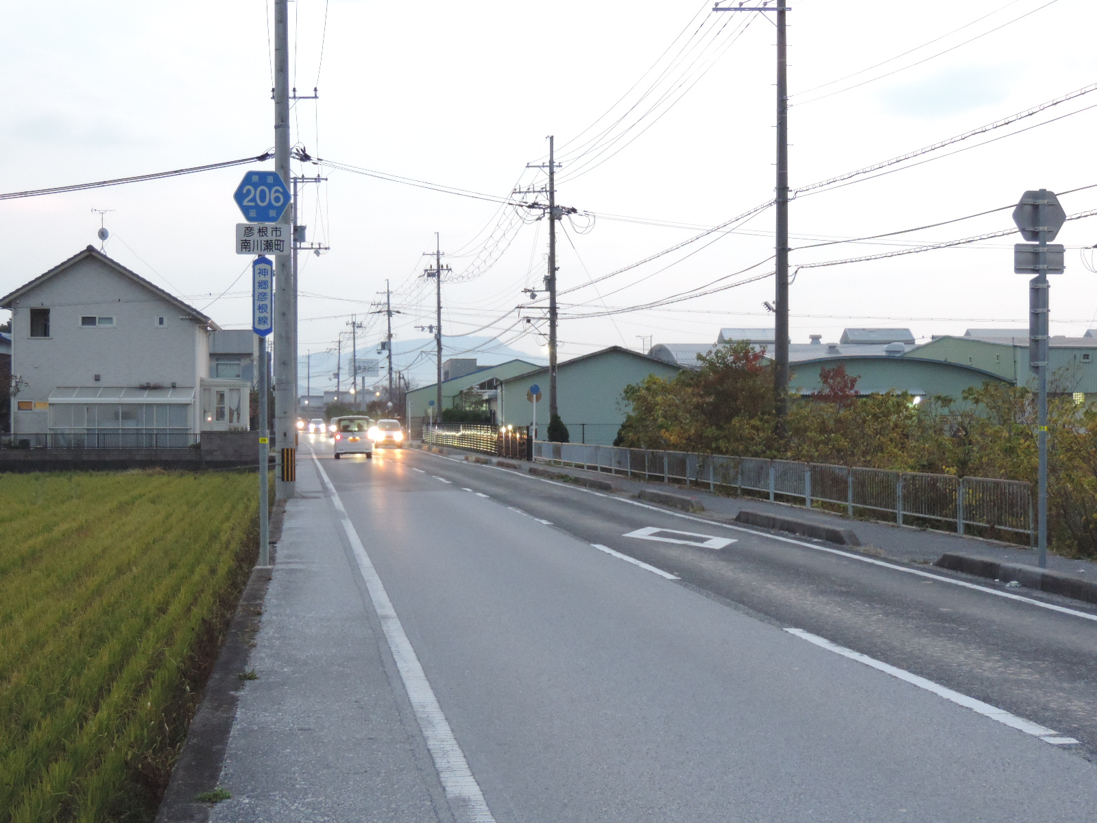 滋賀県道206号神郷彦根線、彦根市南川瀬町にて。2017年撮影